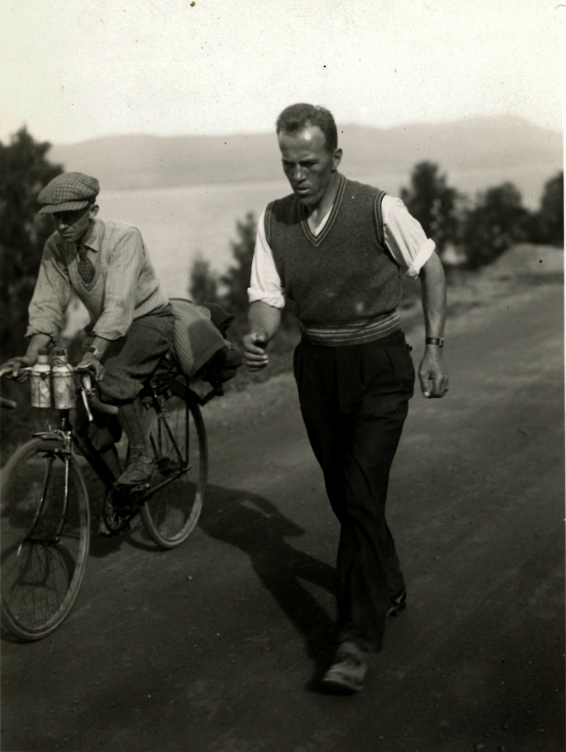 Fotograf: Eirik Sundvor (1902 - 1992). Bildet viser idrettsmannen Johan Støa (1900 - 1991) mens han går styrkeprøven mellom Trondheim og Oslo. Distansen ble tilbakelagt på rekordtiden 4 dager, 21 timer og 3 minutter. I bakgrunnen Mjøsa. Eirik Sundvor (1902 - 1992) var journalist i Avisa Nidaros 1924 - 1940 og 1945 - ca. 1957. Sundvor flyktet til England med sin kone under krigen. Der var han redaksjonssekretær i Norsk Tidend i London. Sundvor hadde god kjennskap til russisk, og ble derfor sendt som major med oberst Arne Dahls ekspedisjon til Finnmark i 1944 / 1945. Sundvor stod for utgivelsen av den første frie norske avis i Finnmark i 1945. Etter at Avisa Nidaros gikk inn som dagsavis flyttet han tilbake til Bergen, hvor han opprinnelig kom fra. Her virket han som korrespondent for Dagbladet i Vest-Norge. The photo shows the athlete Johan Støa whilst walking the tour de force distance Trondheim - Oslo at the record time of 4 days, 21 hours and 3 minutes in 1933. In the background Lake Mjøsa . Photographer Eirik Sundvor (1902 - 1992) was a journalist for the newspaper Nidaros 1924 - 1940 and 1945 - ca. 1957. Sundvor escaped to England as a refugee together with his wife during WW2. In England he was editorial secretary of the norwegian exile government's newspaper Norsk Tidend in London. Sundvor had a good knowledge of russian, and was therefore sent as a major together with the norwegian expeditionary forces to Finnmark 1944 - 1945. When the newspaper Nidaros went bankrupt in 1957, he moved back to Bergen where he originated from. From Bergen he functioned as a correspondent to the Oslo-newspaper Dagbladet.